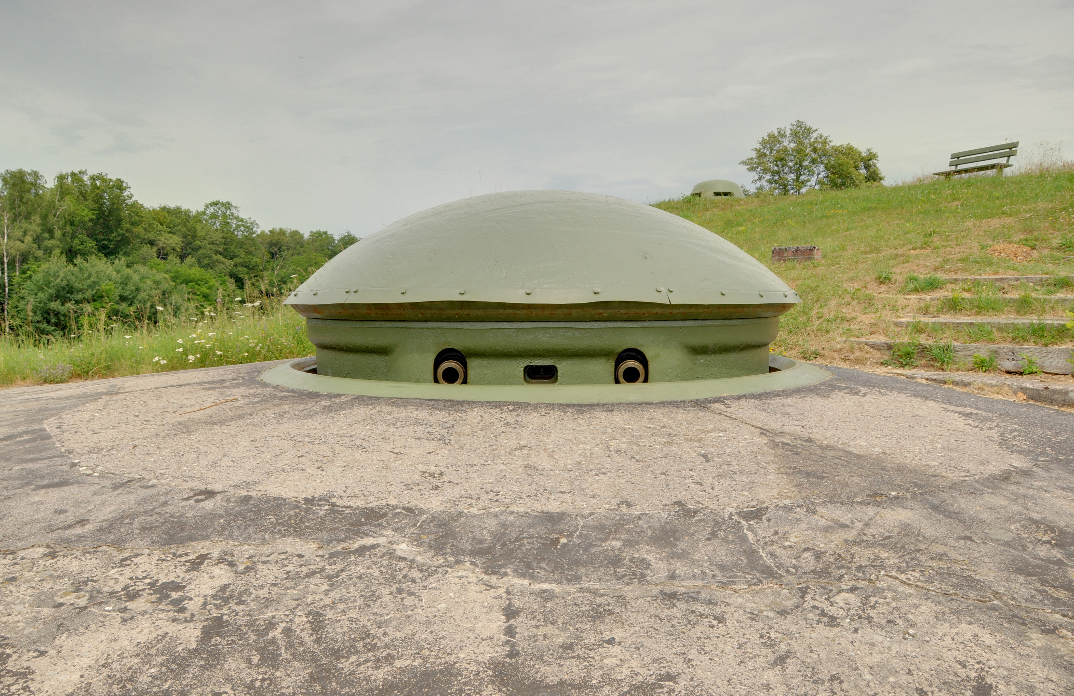 Tourelle de 75R vue de l'extérieur (HDR).